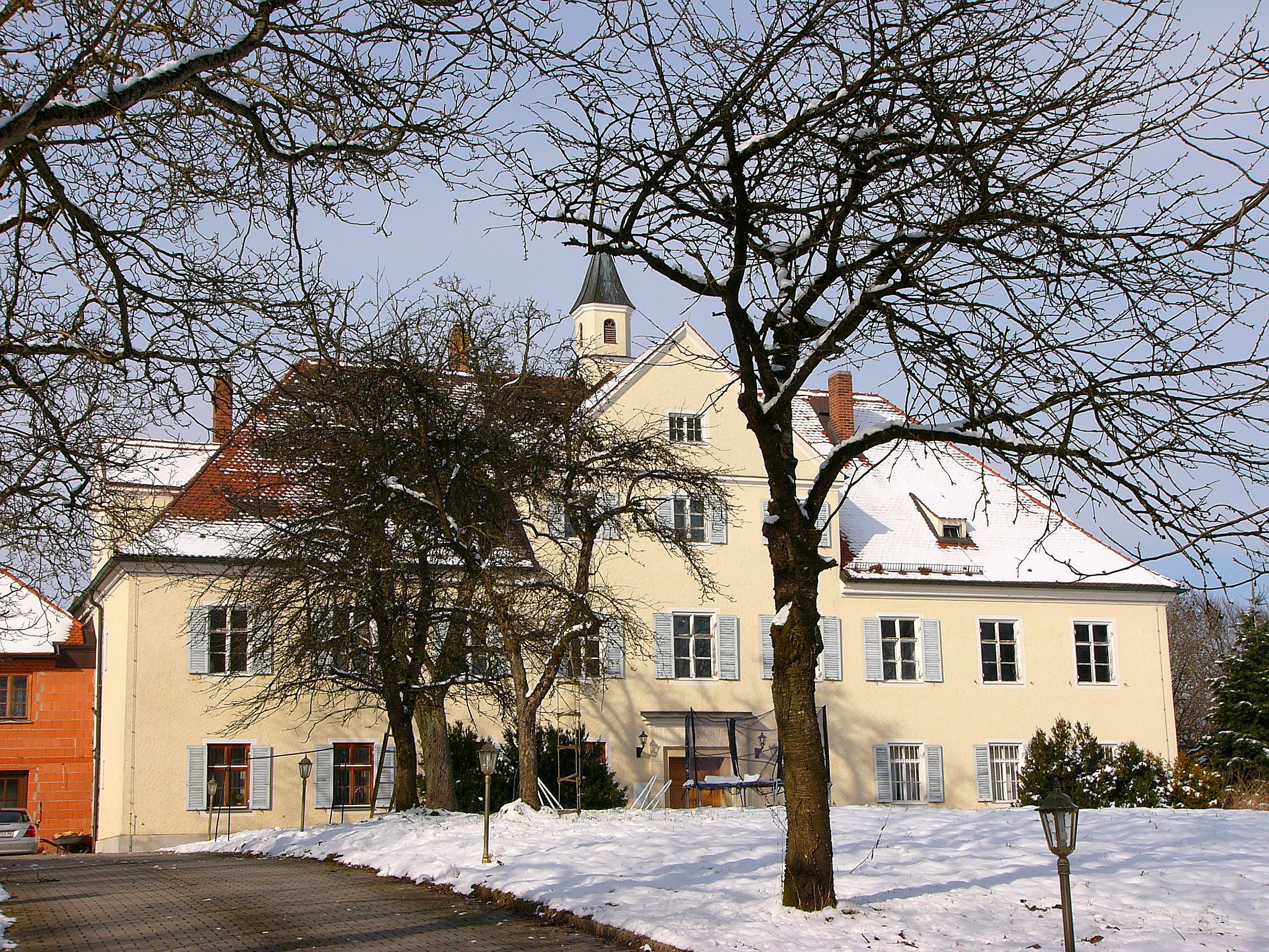 "Monischlößchen"; zweigeschossiger Walmdachbau mit Zwerchhaus und achtseitigem Dachreiter, erbaut 1738 von Hofmaurermeister Johann Georg Hirschstetter; mit Ausstattung; ehem. Kapelle, jetzt profaniert.This is a photograph of an architectural monument.